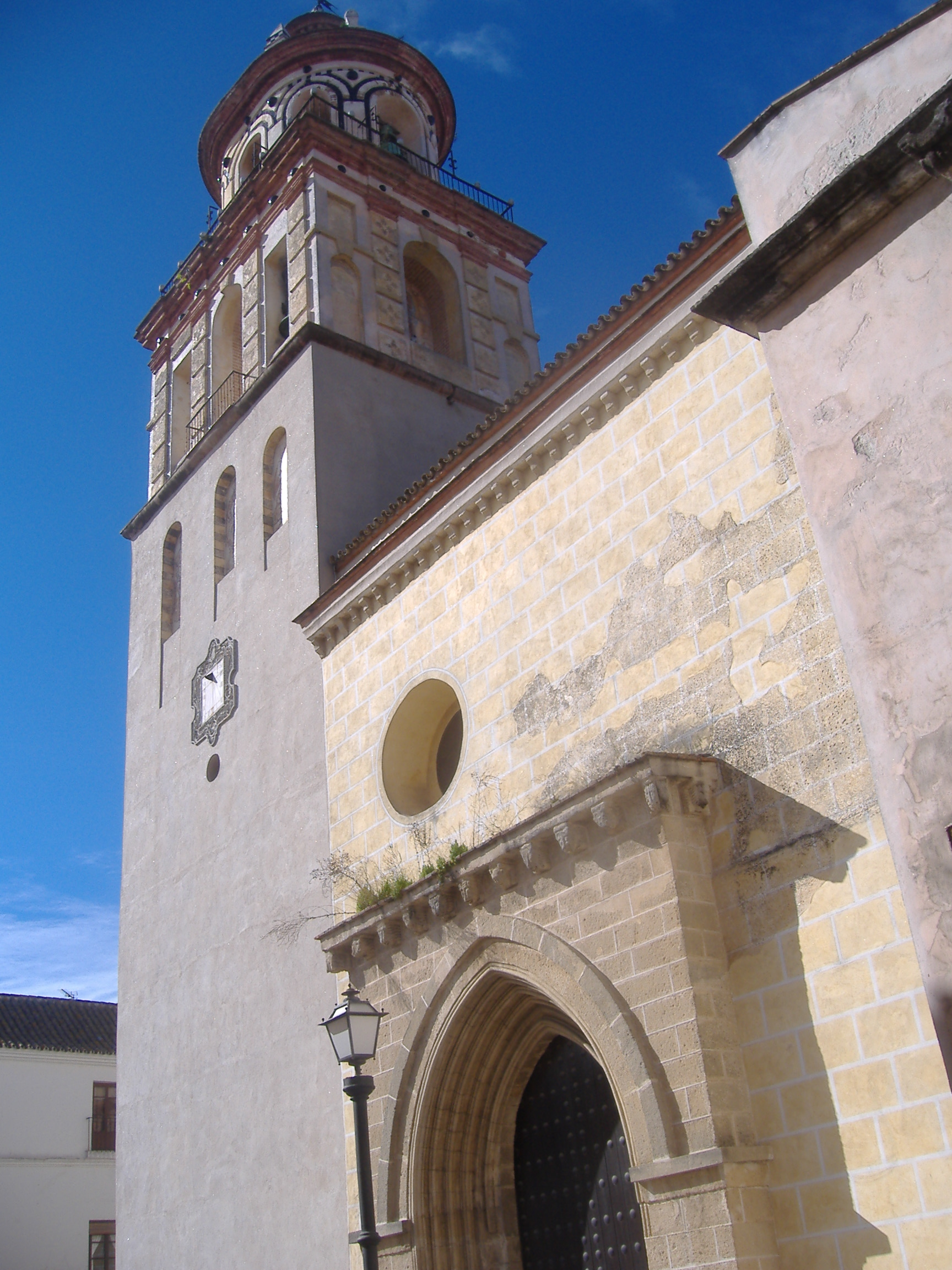 Sanlúcar de Barrameda. Iglesia de la O. Portada lateral y torre.JPG